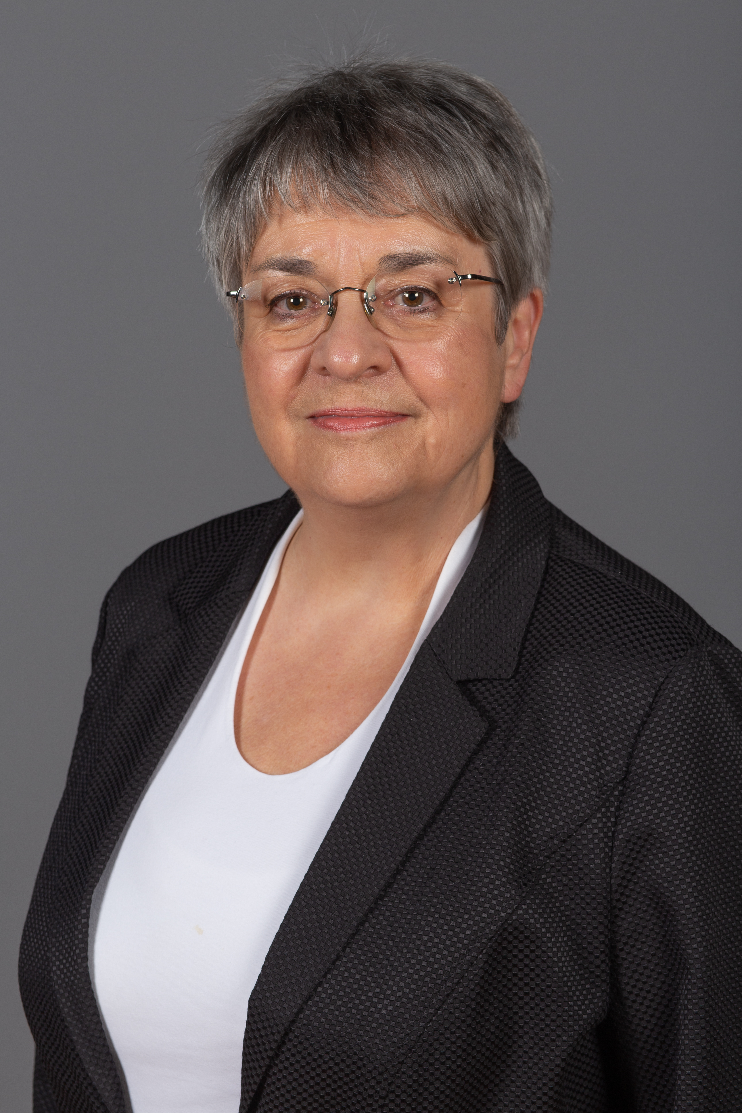 Abgeordnete(r) der Bürgerschaft der Freien und Hansestadt Hamburg Monika Schaal